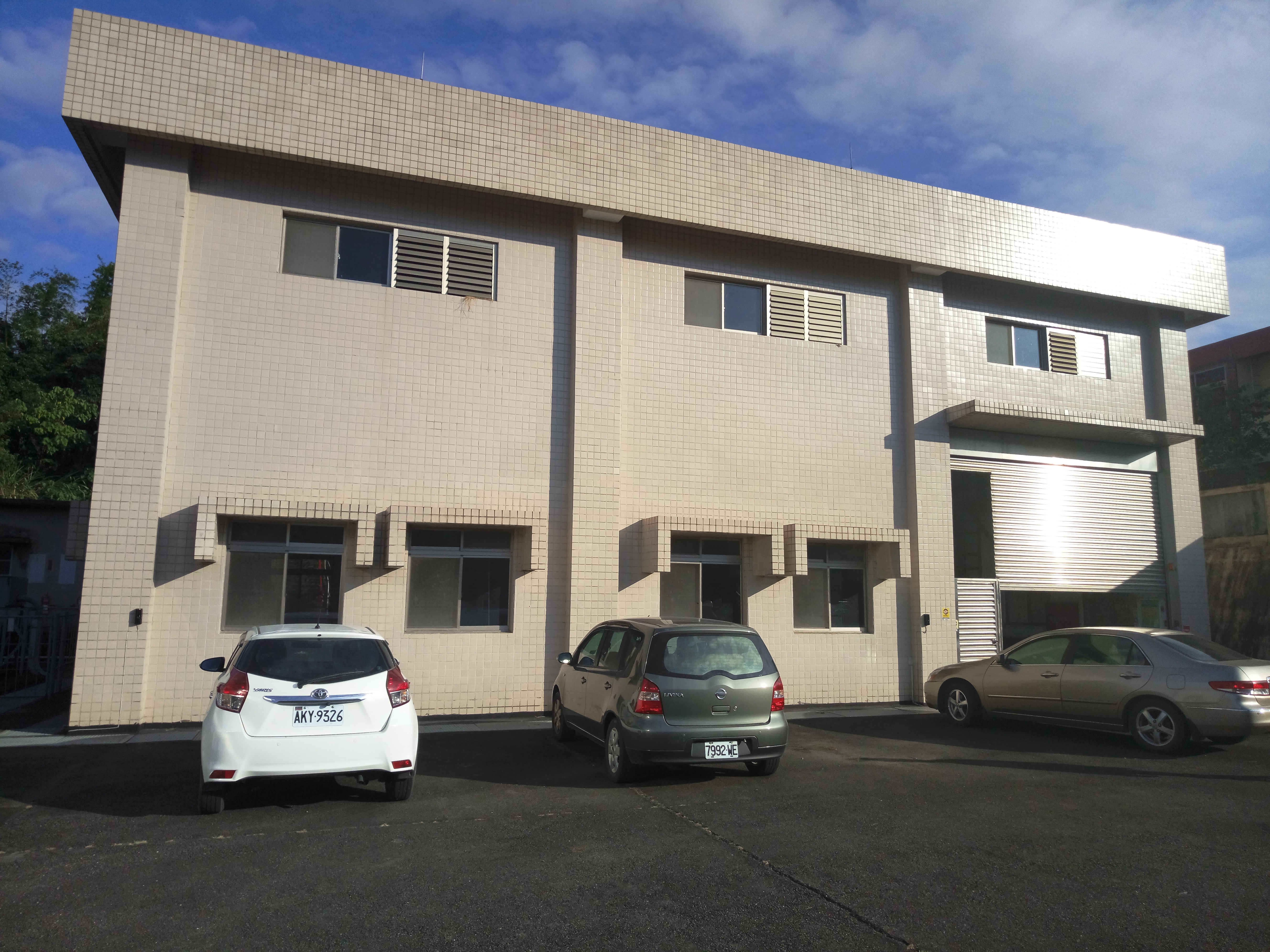 大甲溪發電廠社寮機組發電廠房外觀